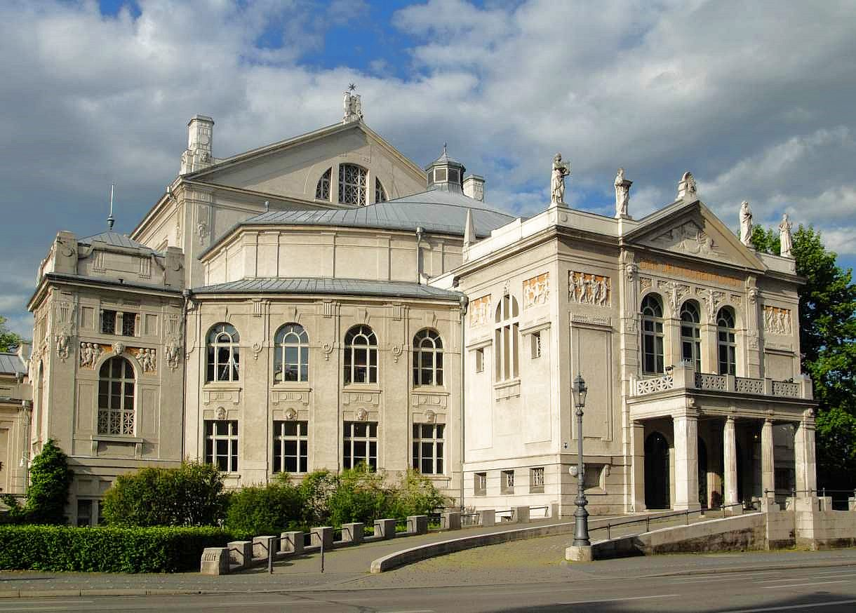 Prinzregententheater, München/munich